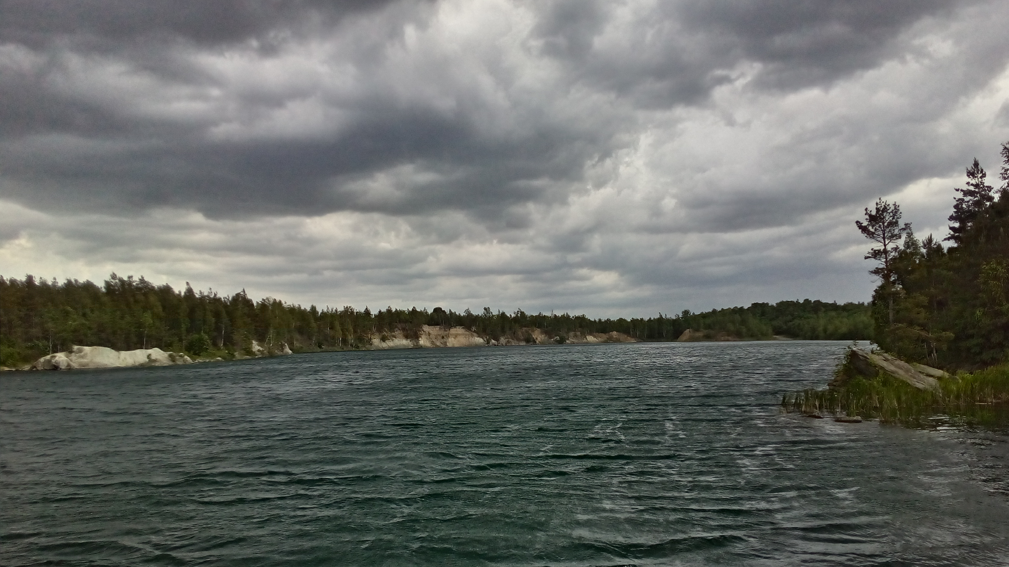 Фотография пашинского карьера вдоль